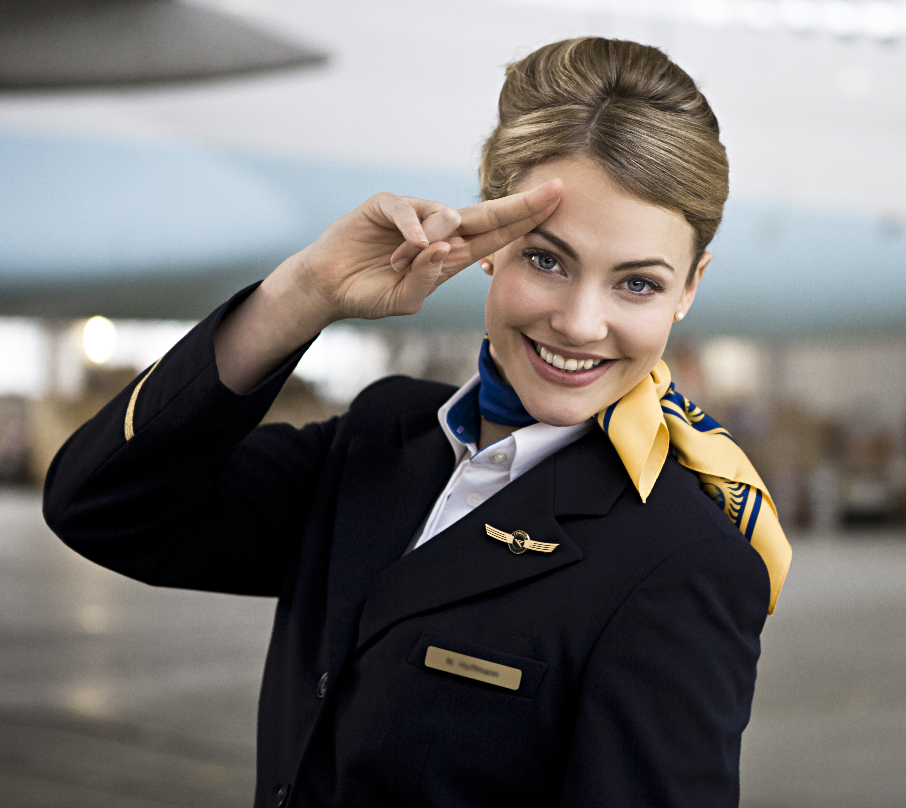 Condor setzt im neuen Sicherheitsvideo auf klare Sicherheitshinweise, die dem Fluggast in Erinnerung bleiben, aber gleichzeitig auch unterhaltsam sein sollen.